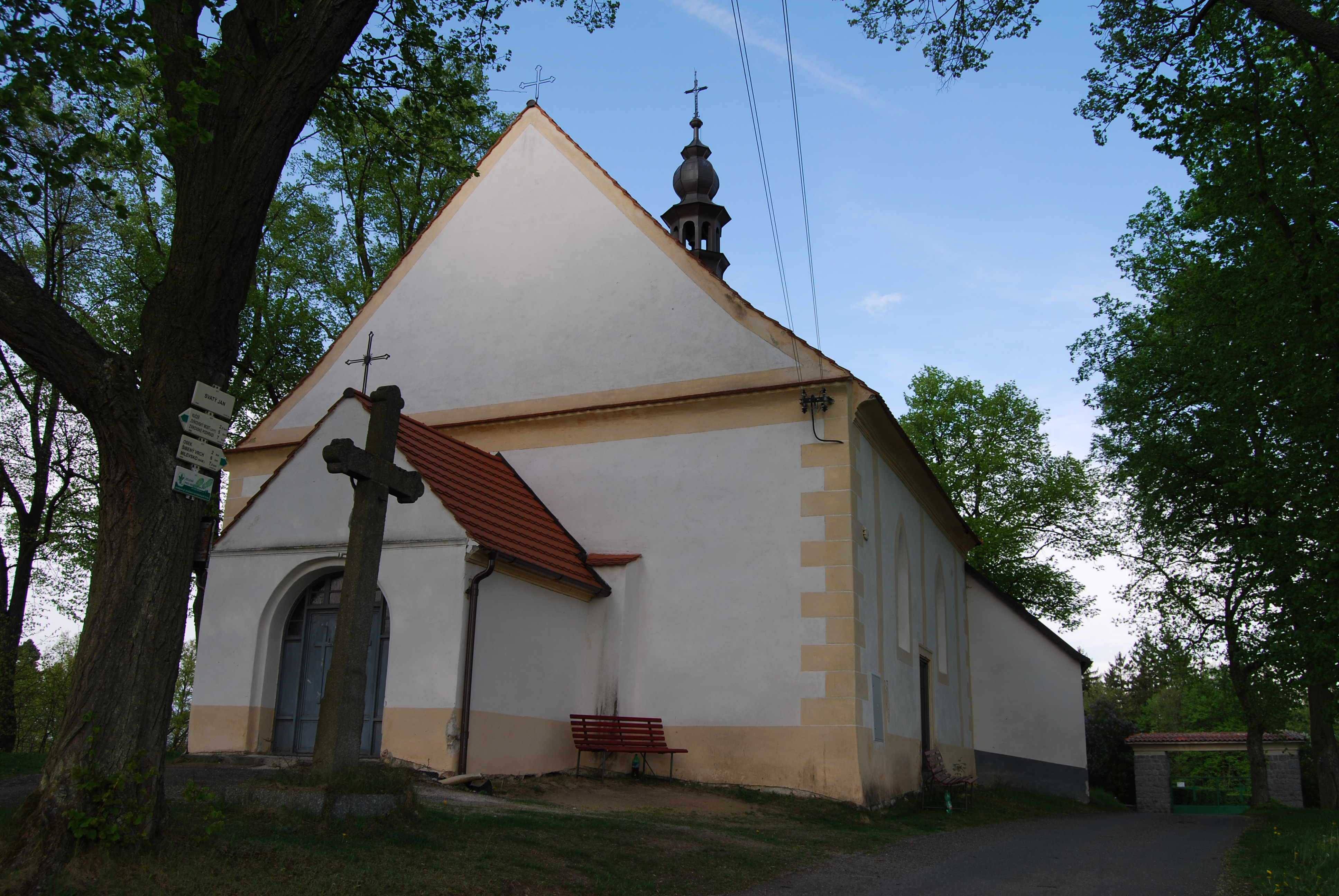 Kostel svatého Jana Křtitele. Svatý Jan (Květov). Okres Písek. Česká republika.